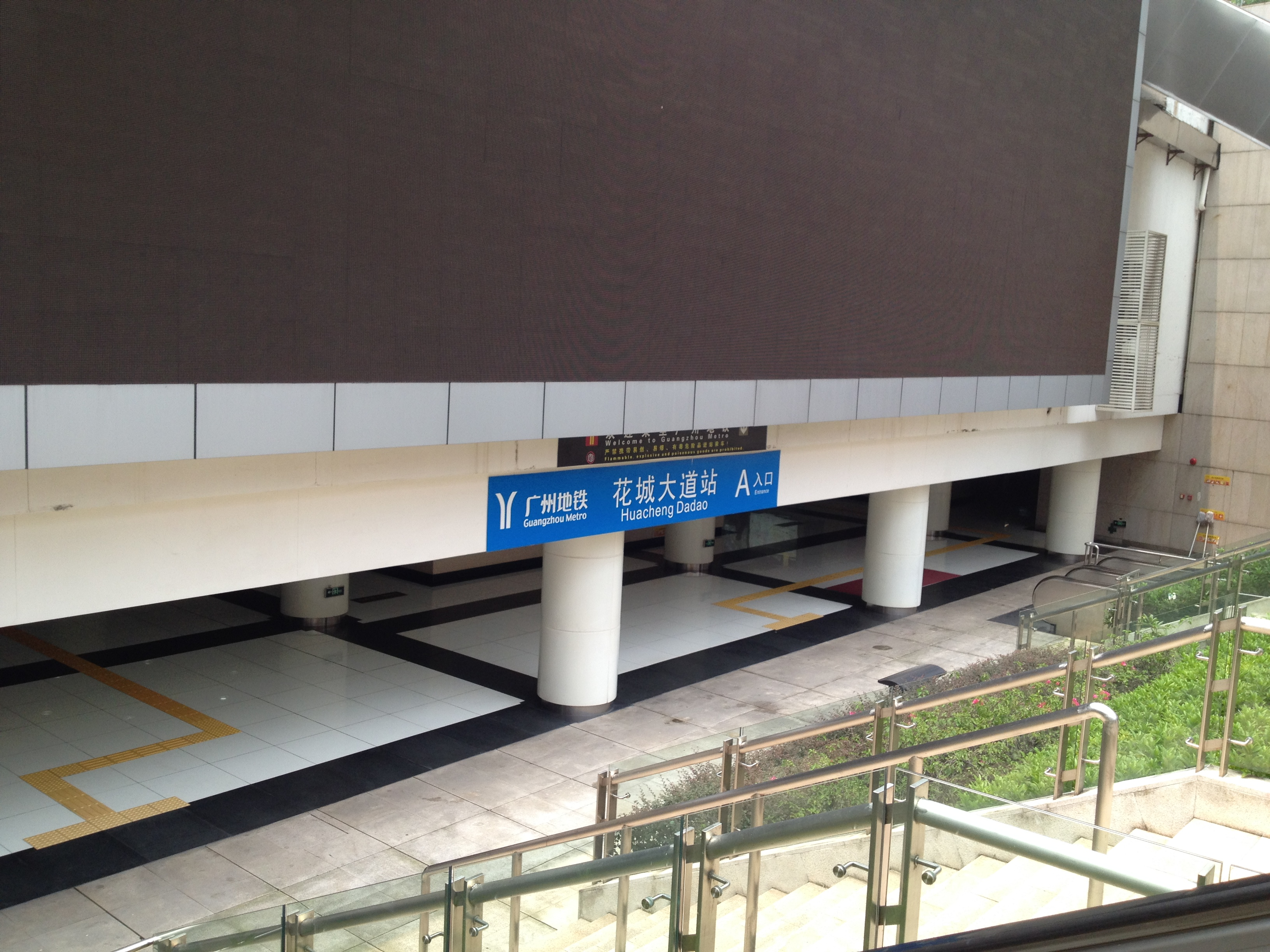 广州地铁花城大道站A出口